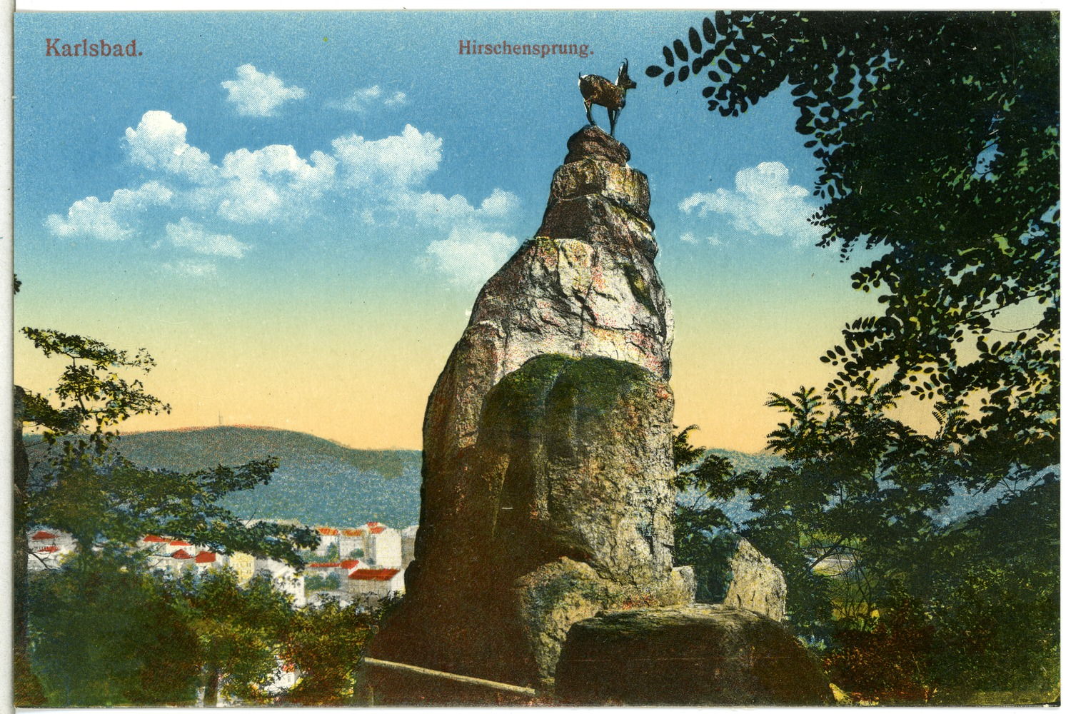 Karlsbad; Hirschensprung This postcard is from publisher Brück & Sohn in Meißen ( This postcard has a unique number 15440 and is available in a higher resolution at the publisher. This images was uploaded in a cooperation project between Wikipedians and the publisher.